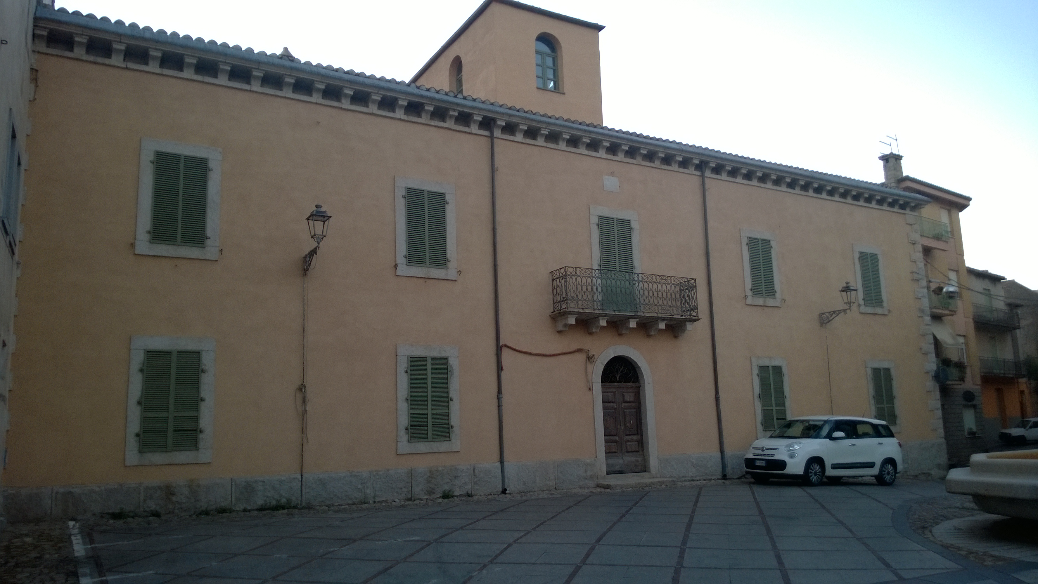 Palazzo storico di Calangianus